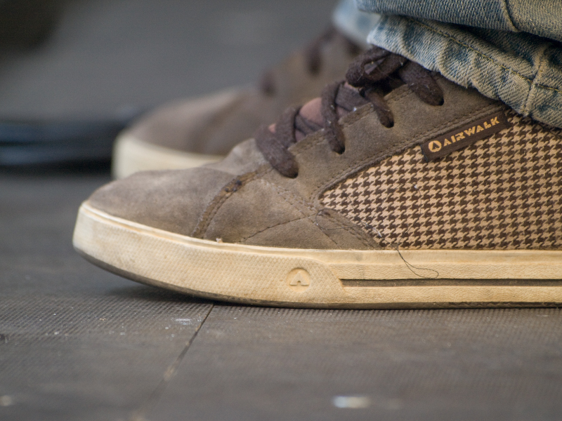 Festival Sonorama Ribera 2009, en Aranda de Duero. Actuación de Arizona Baby en la Plaza del Trigo.